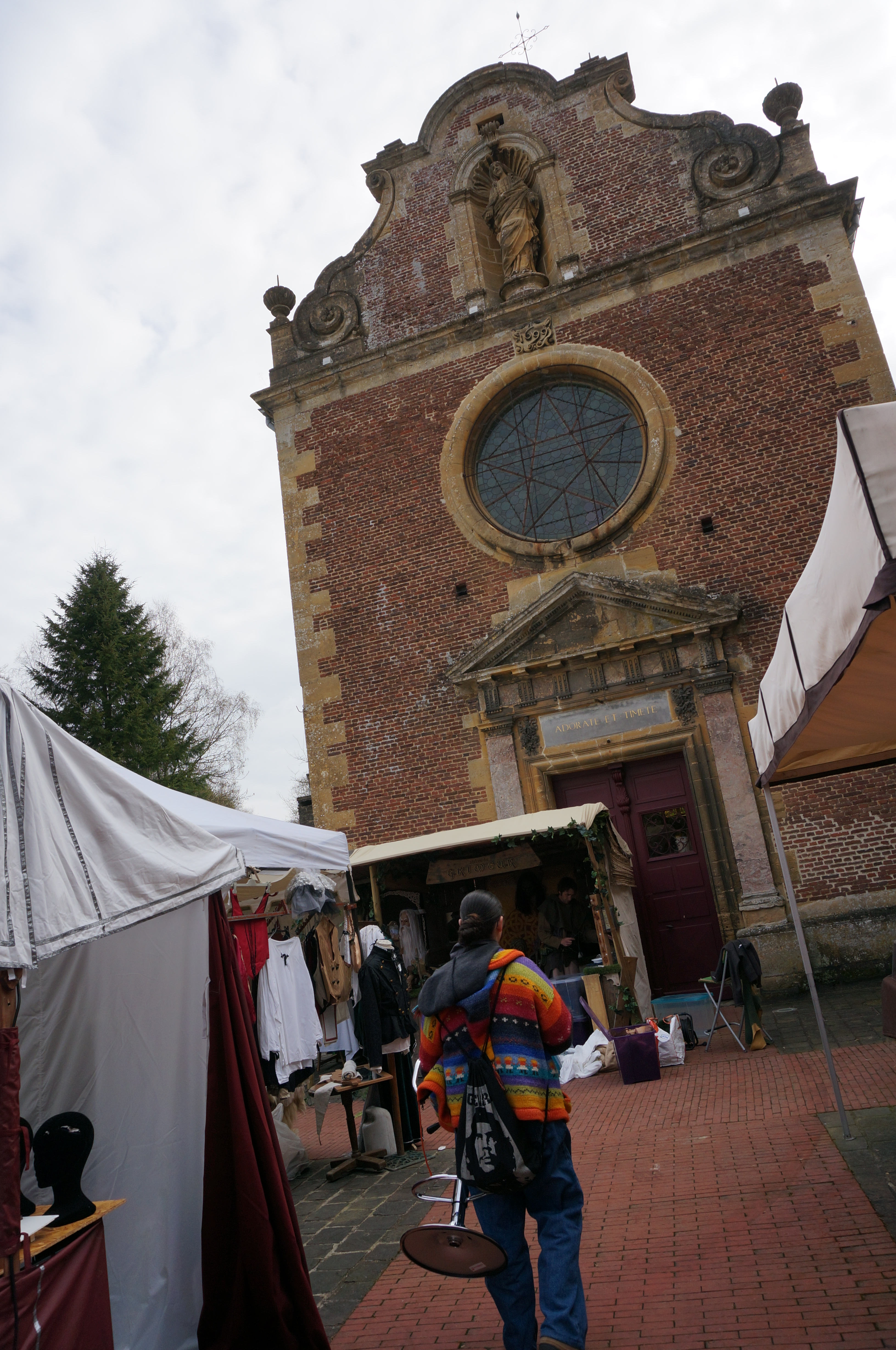 Lors du Printemps des Légendes 2014.